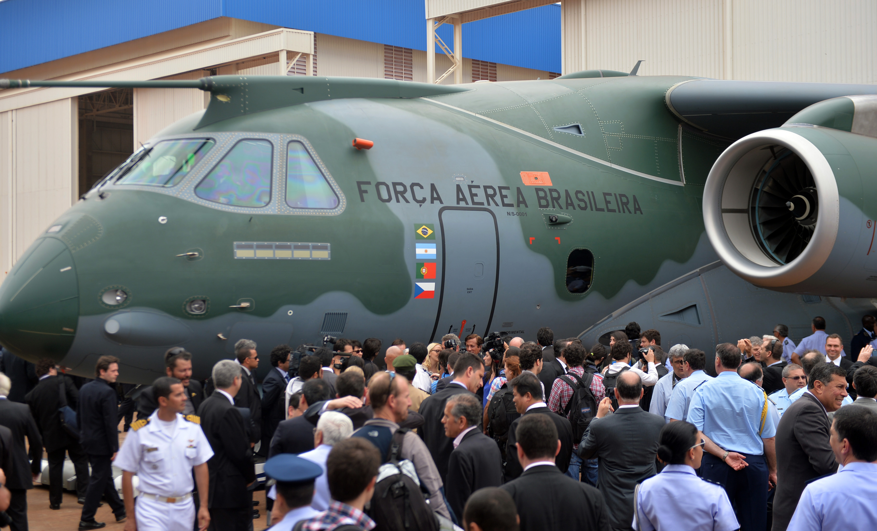 21/10/2014, Gavião Peixoto - SP Fotos: Tereza Sobreira